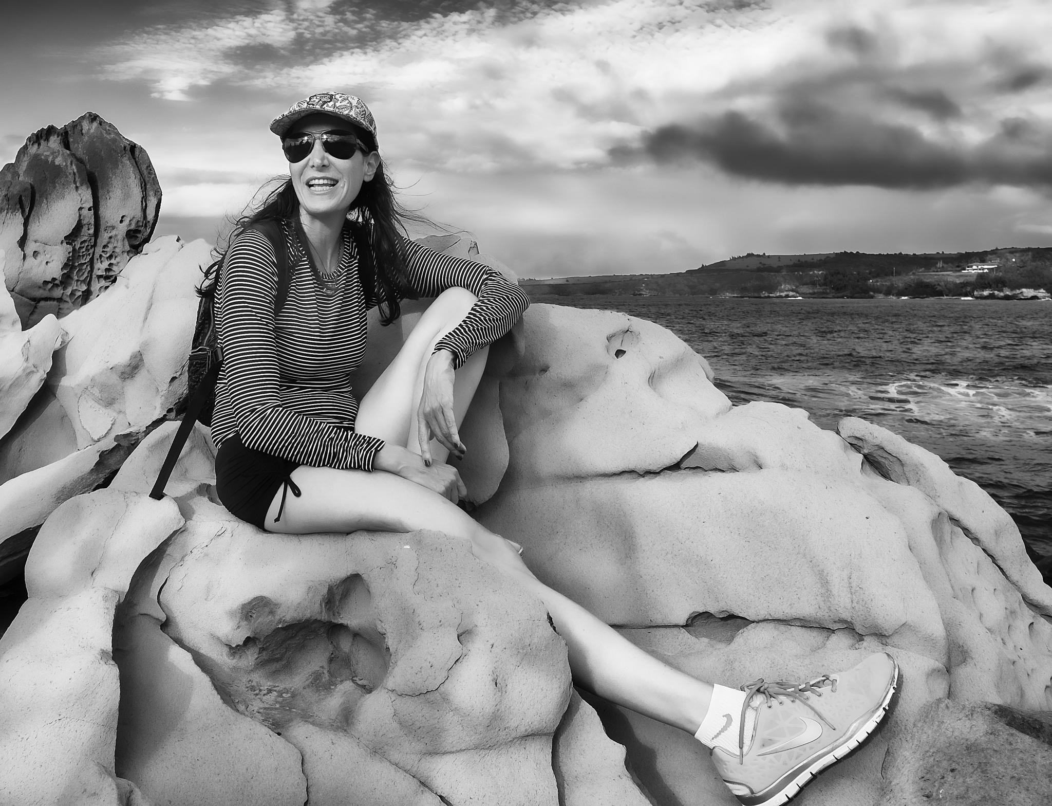 tina sharkey